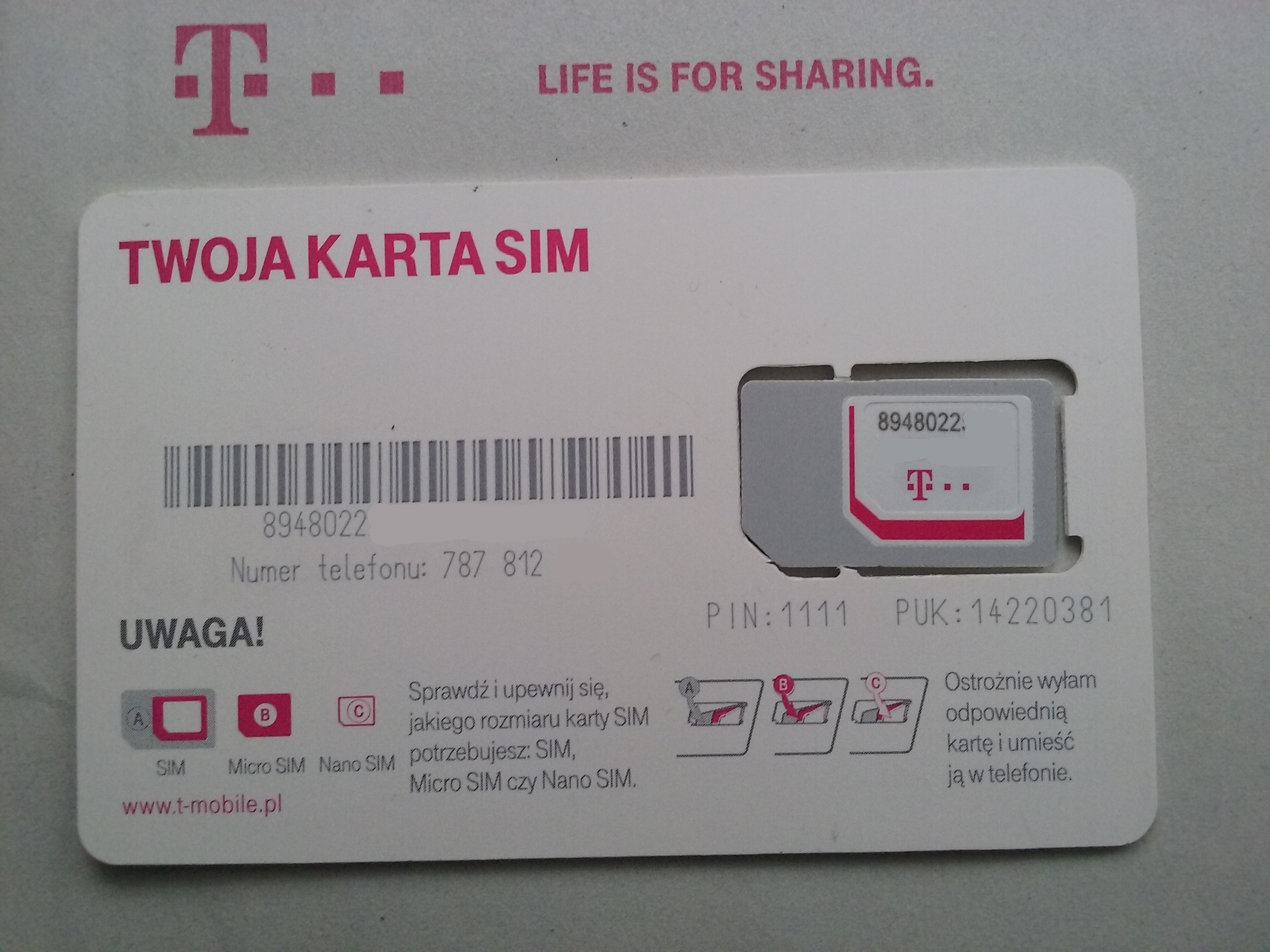 SIM card T–Mobile Poland (back)